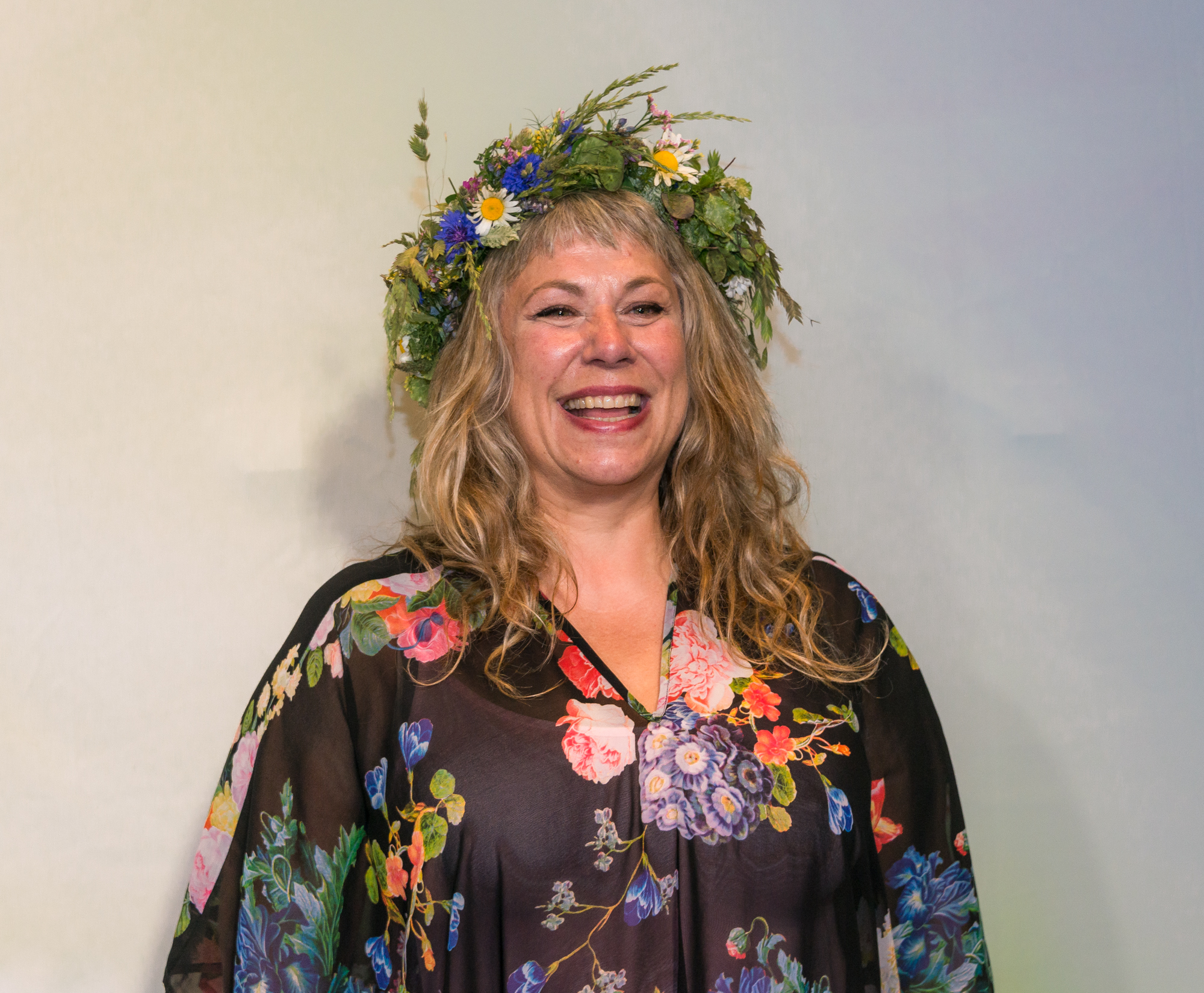 Stina Wollter, Sommarvärd i P1, på röda mattan på väg in i Berwaldhallen i Stockholm den 13 juni 2019.